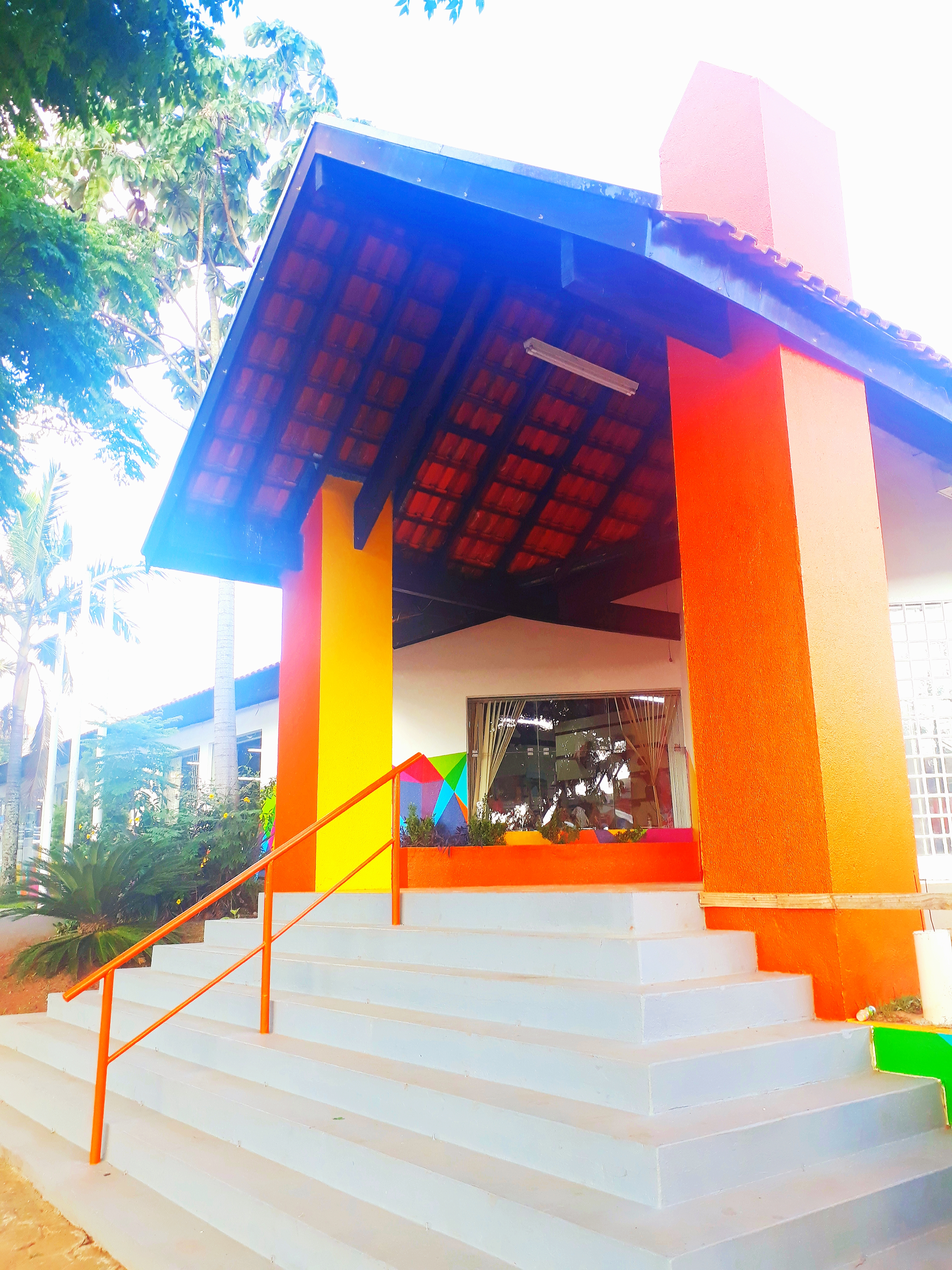 Entrada da Casa do Artesão, em Telêmaco Borba, no Paraná.